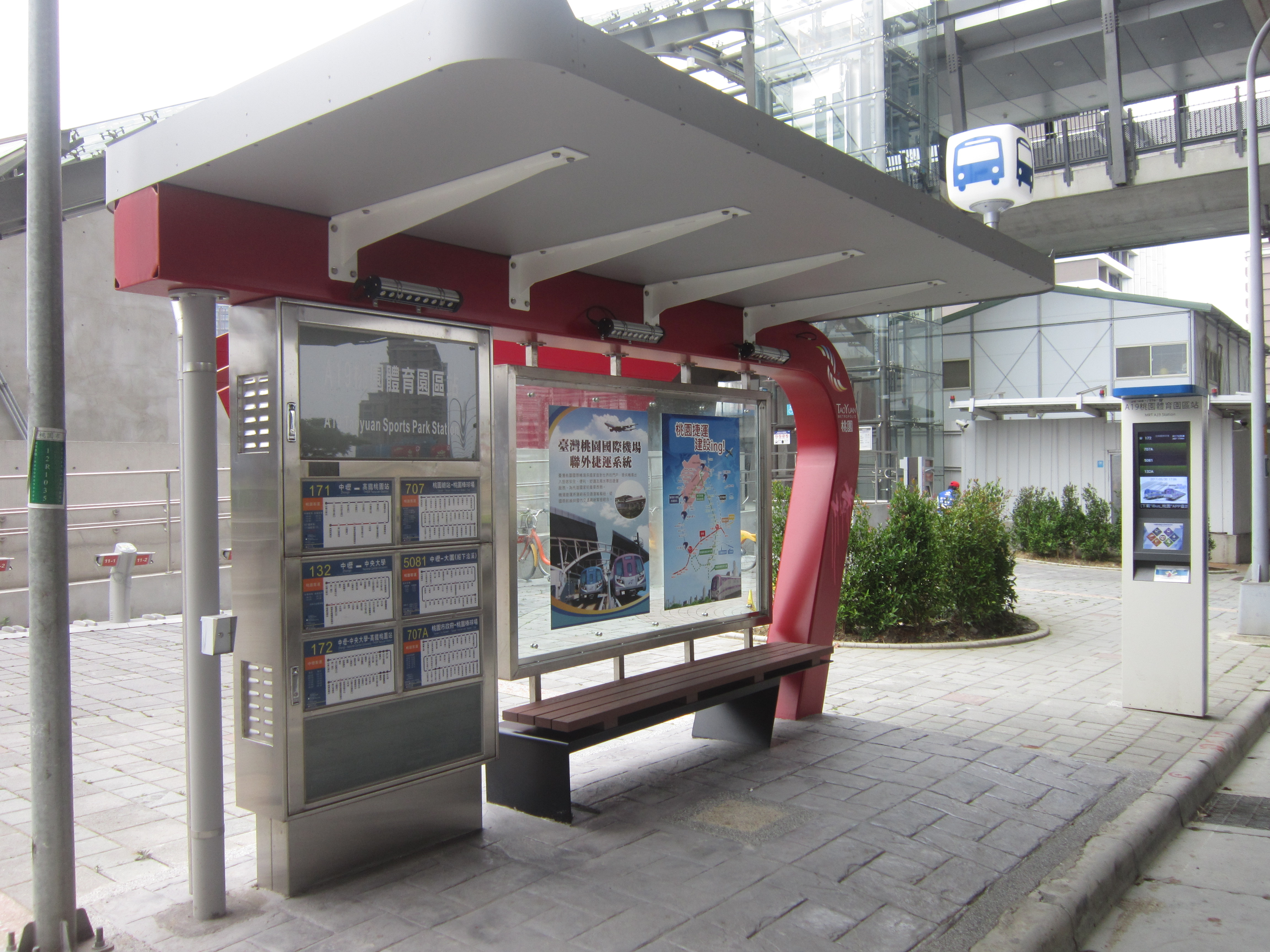 桃園市公車「桃園體育園區站」候車亭及一旁的桃園捷運桃園體育園區站。